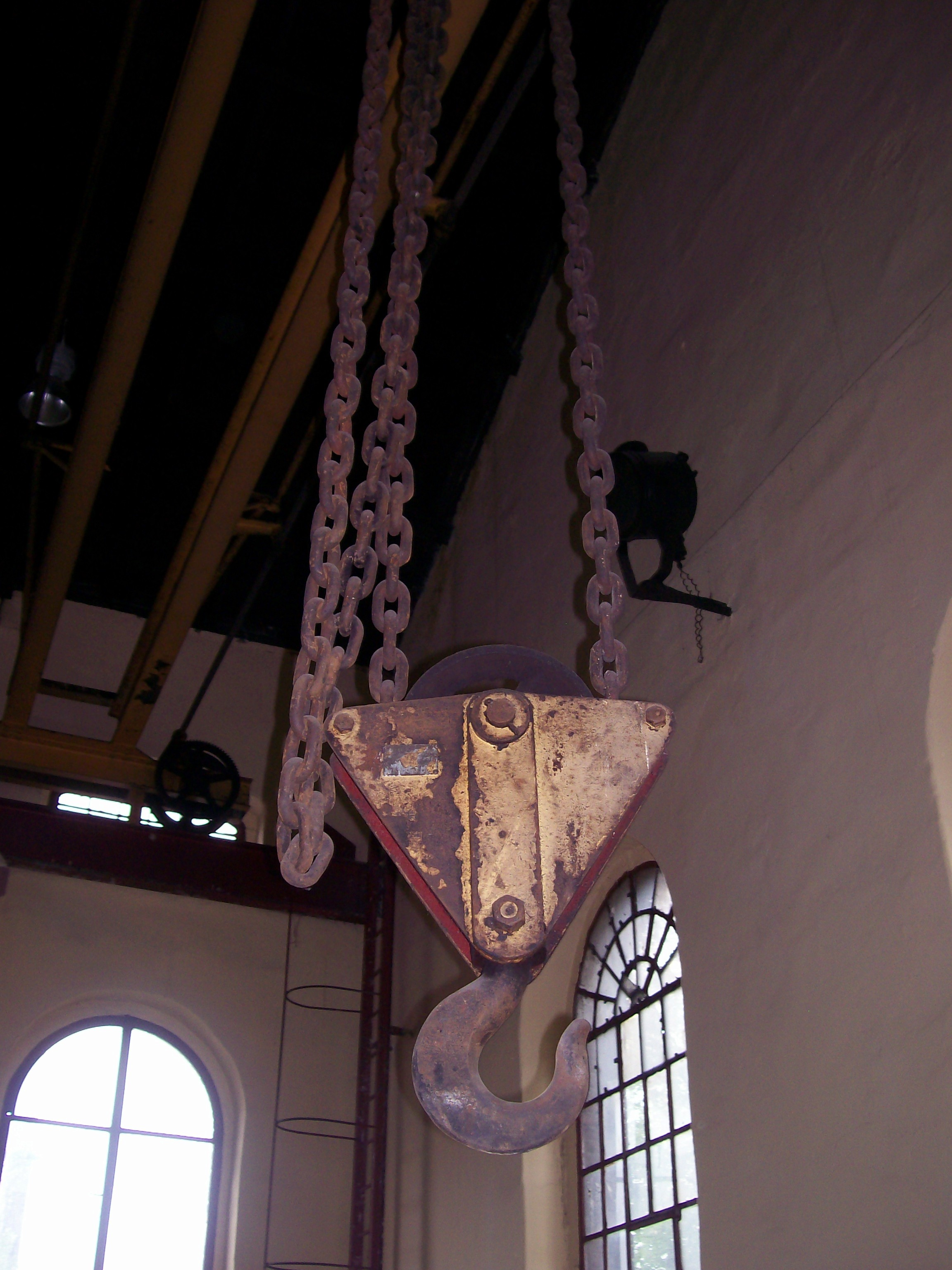 Tereny dawnej kopalni Katowice.